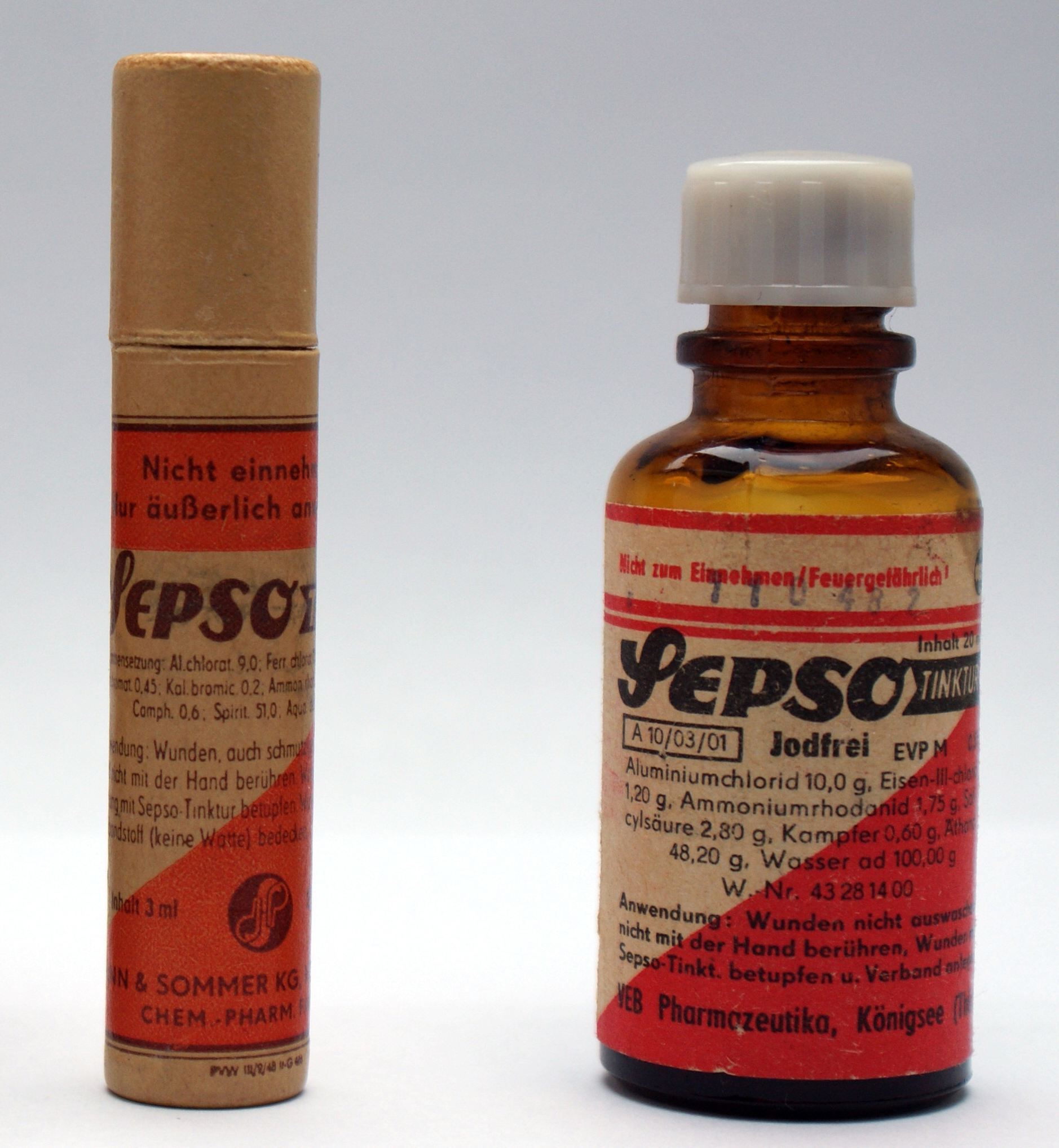 Sepso Präparate